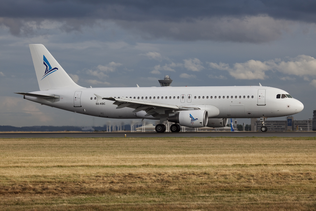 SU-KBC A320 Lotus